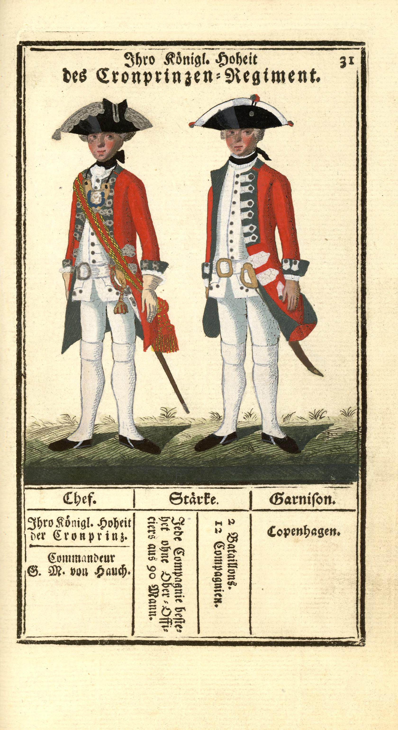 Illustrasjon hentet fra boken "Vorstellung der sämtlichen Königl. Dänischen Armee" av Bertram, Carl og utgitt av Carl Bertram (dk, 1763)